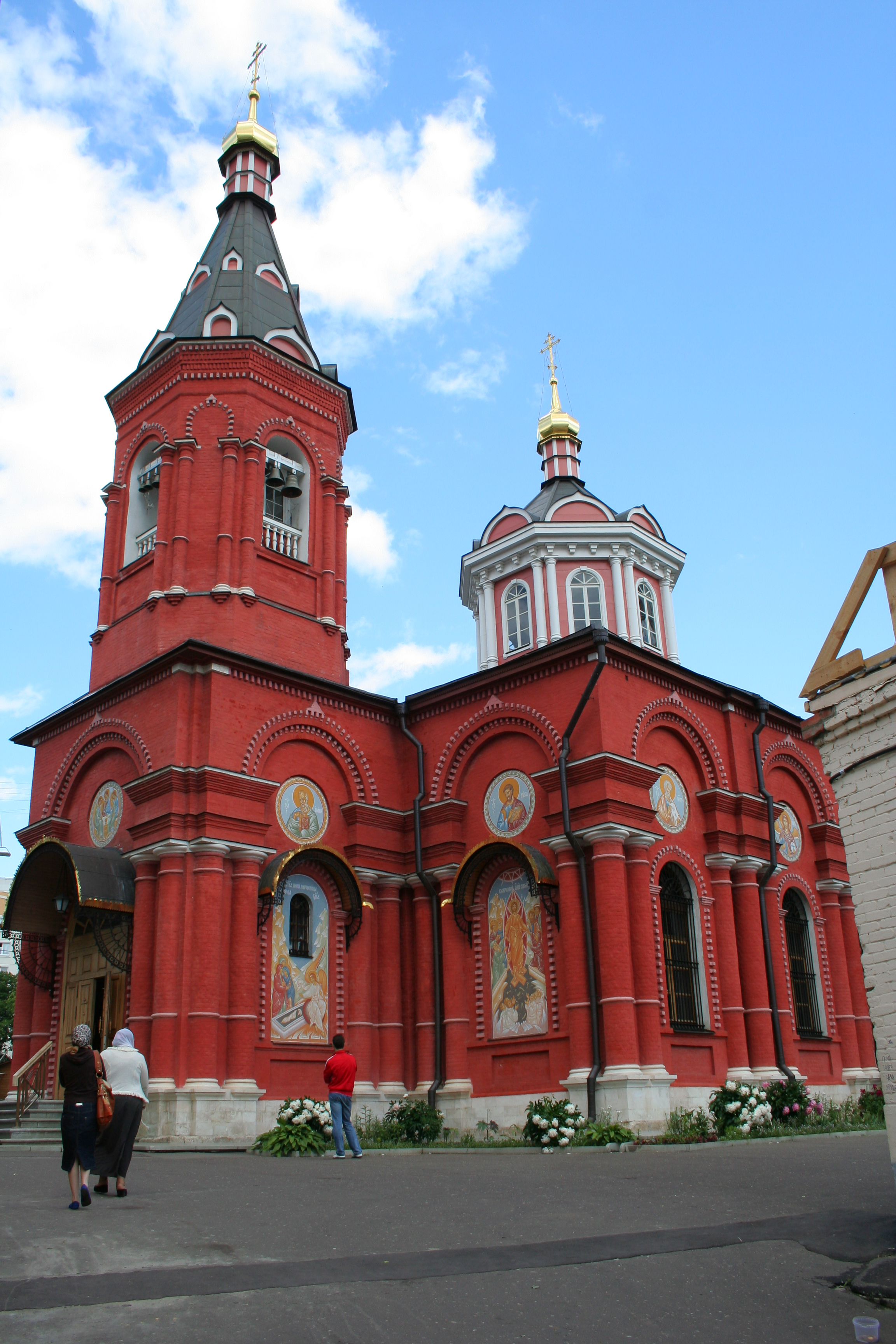 Kirche der Heiligen Fürsten Boris und Gleb zu Degunino, Moskau.